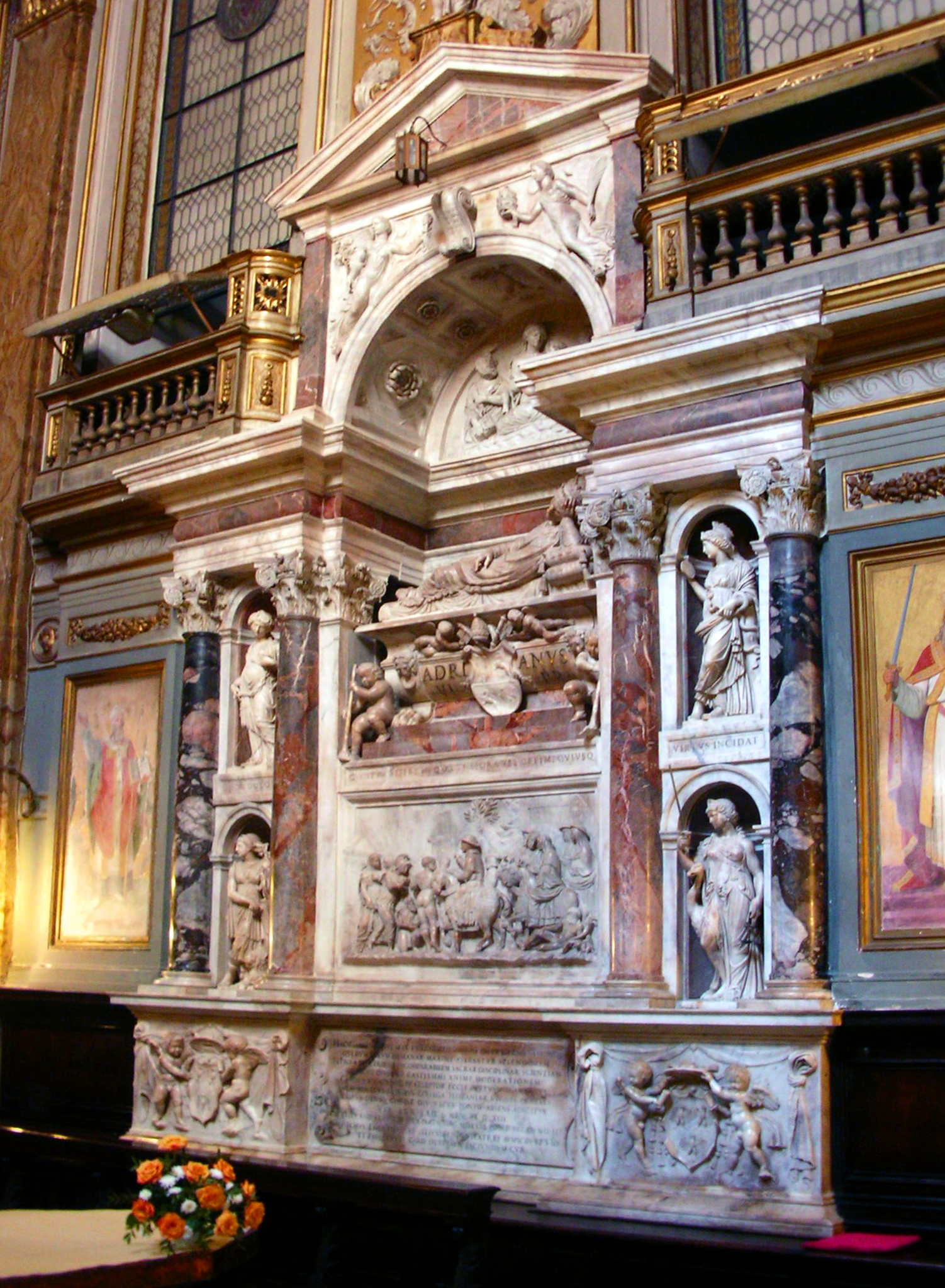 Tomb of Pope Adriano VI, Santa Maria dell'Anima, Rome